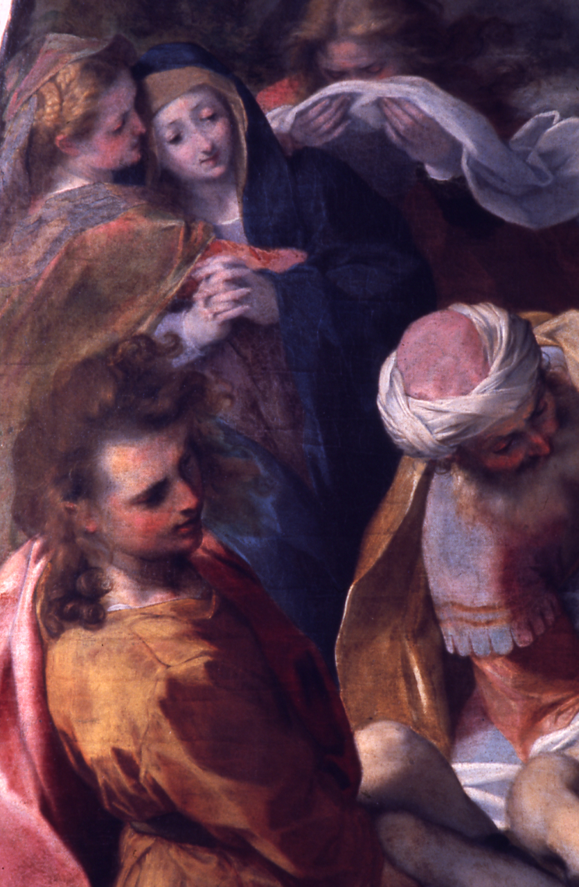 Servizio fotografico : Urbino, 1975 / Paolo Monti. - Foglio: 1, Fotogrammi complessivi: 10/20 : Diapositiva, sviluppo cromogeno/ pellicola ; 35 mm. - ((Le diapositive nn. 11-20 costituiscono altre serie. - Occasione: Documentazione per la mostra di Federico Barocci (Urbino, 1535-1616), catalogo della mostra, Bologna 1975, a cura di Andrea EMILIANI, Bologna, Edizioni Alfa.